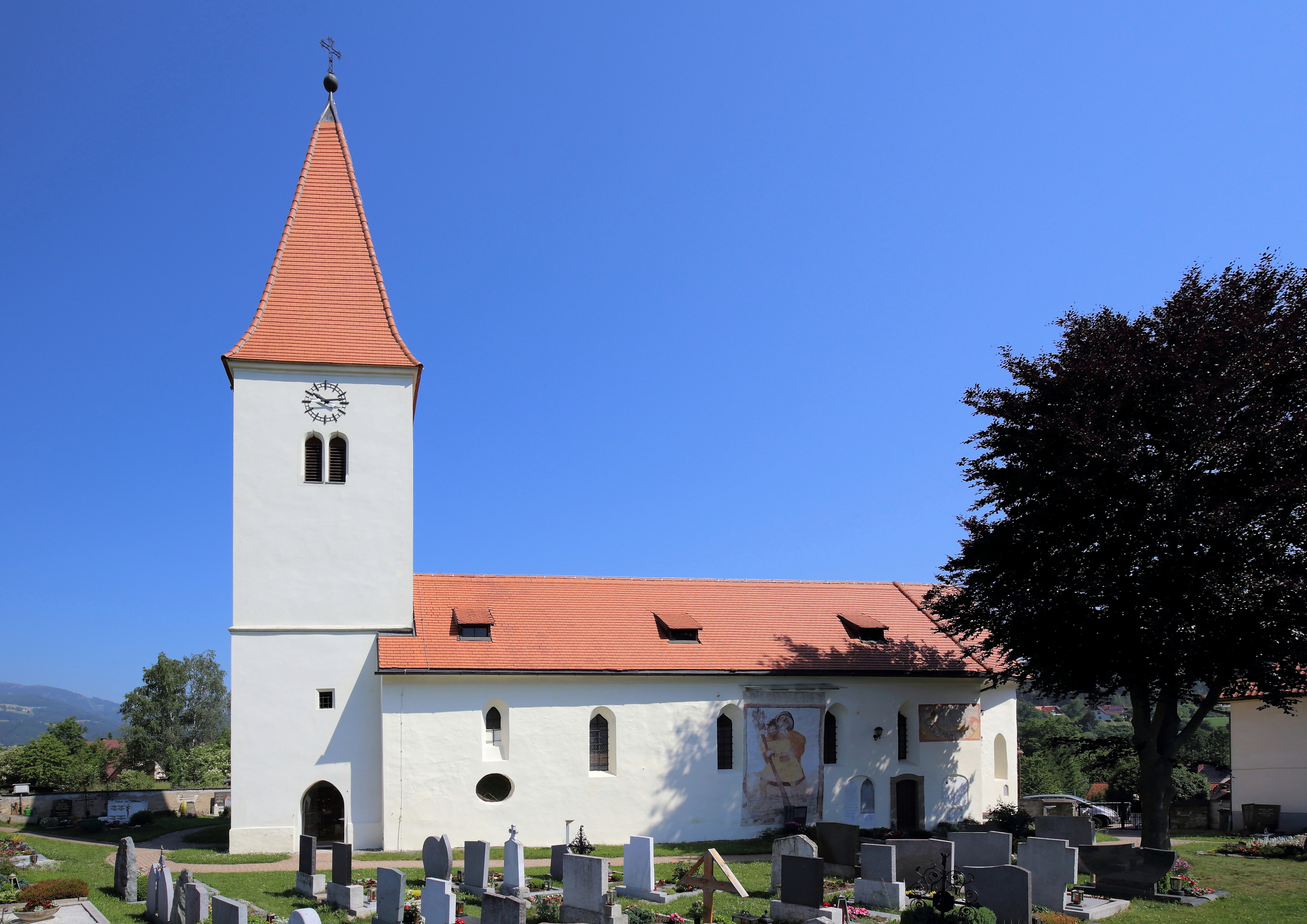 Südostansicht der Filialkirche hll. Johannes der Täufer und Evangelisten in Feistritz bei Knittelfeld, ein Ortsteil der österreichischen Gemeinde Sankt Marein-Feistritz im steirischen Bezirk Murtal. Die zweischiffige Kirche, die von einem ummauerten Friedhof umgeben ist, wurde 1445 errichtet. Nach einer Umgestaltung erfolgte 1515 durch den Bischof von Triest eine Neueinweihung. Zur Gotik- und Barockzeit erfolgten weitere Umgestaltungen. Im Jahr 1972 wurden Wandmalereien aus dem 15. und 16. Jahrhundert freigelegt.